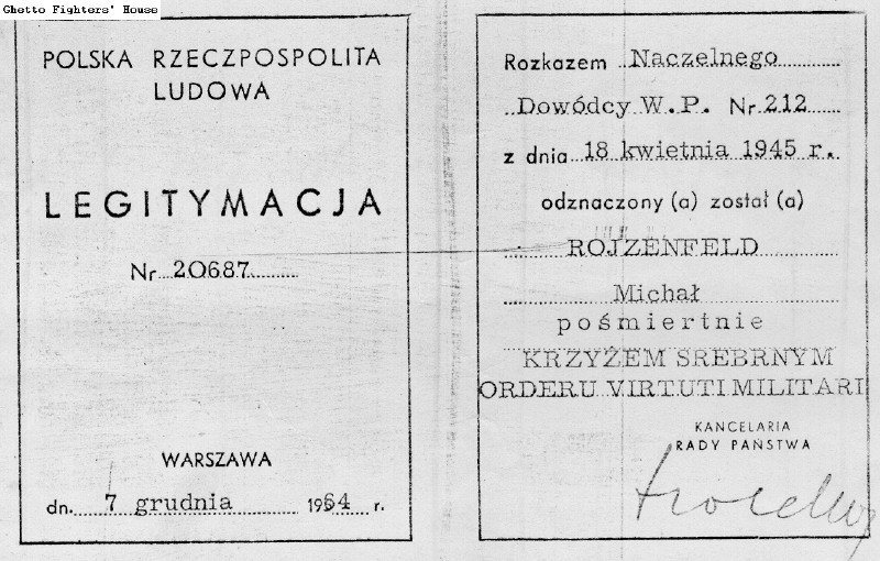 אות הצטיינות שקיבל מיכאל רוזנפלד מממשלת פולין, כהוקרה על לחימתו במרד גטו ורשה